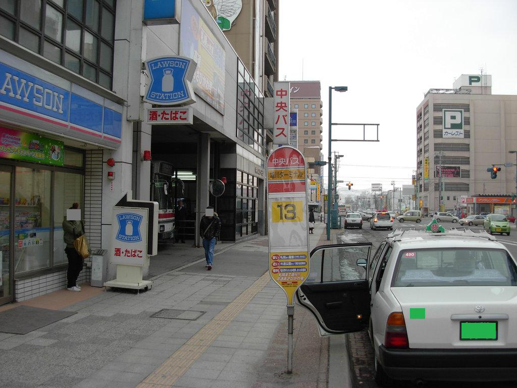 Asahikawa bus terminal(Hokkaido Chuo Bus)